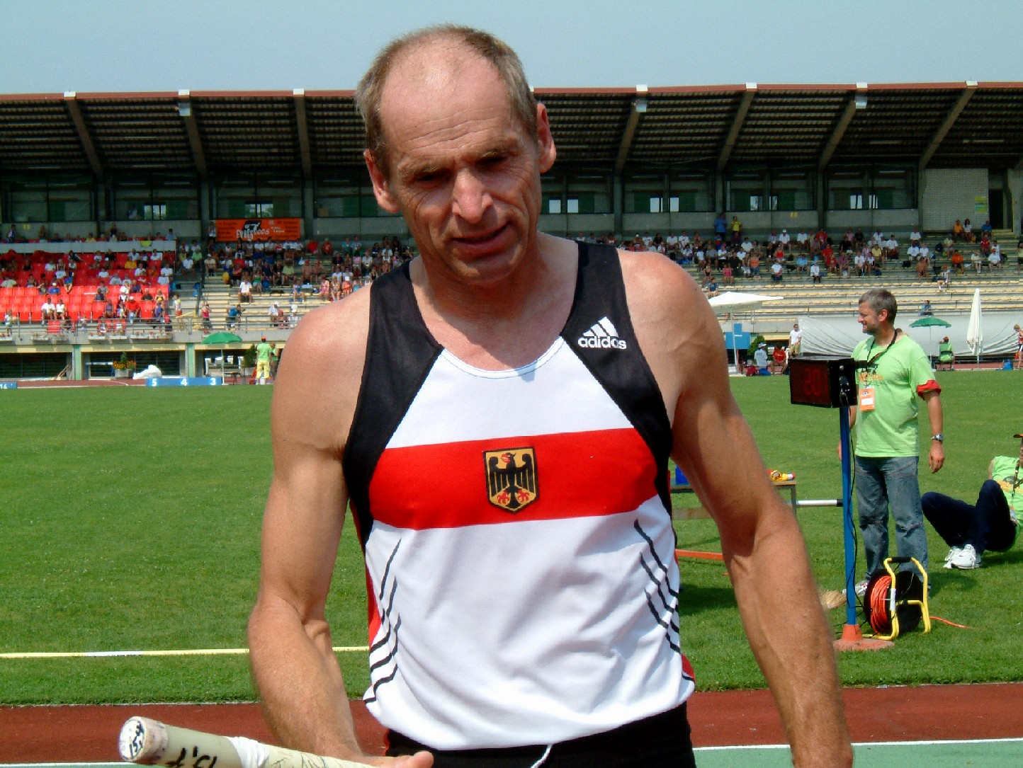 Wolfgang Ritte von der LAV Bayer Uerdingen/Dormagen